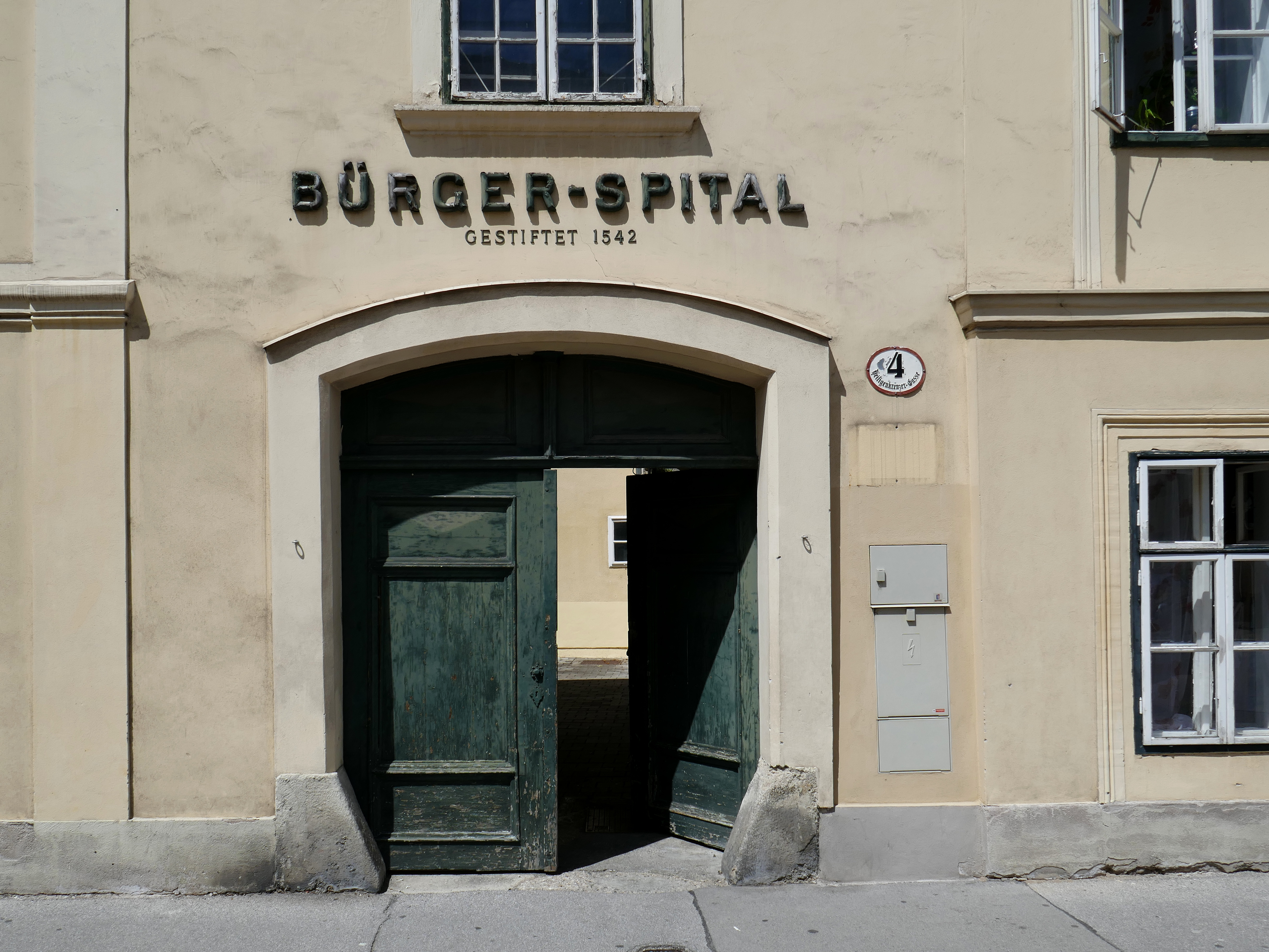 Bürgerspital (Heiligenkreuzergasse 4) in Baden bei Wien.